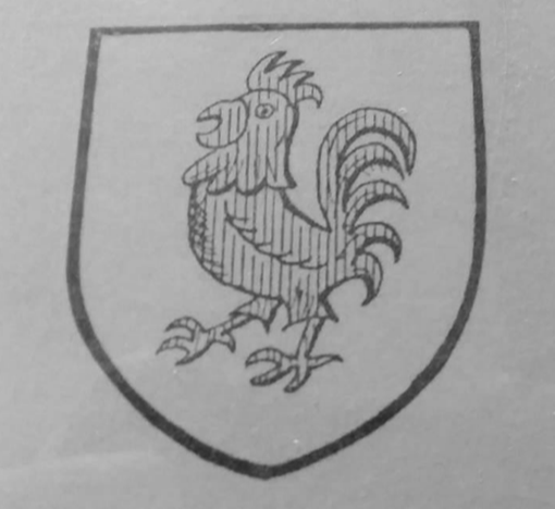 Zwart-witprent van het familiewapen van de familie Stans (Amsterdam)